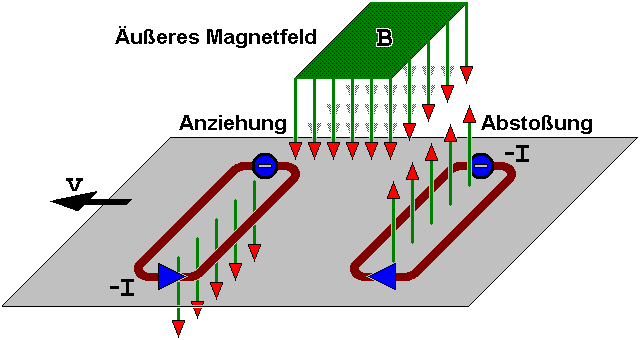 Bremswirkung der magnetischen Felder von Wirbelströmen in einer sich durch ein externes Magnetfeld bewegenden Metallplatte